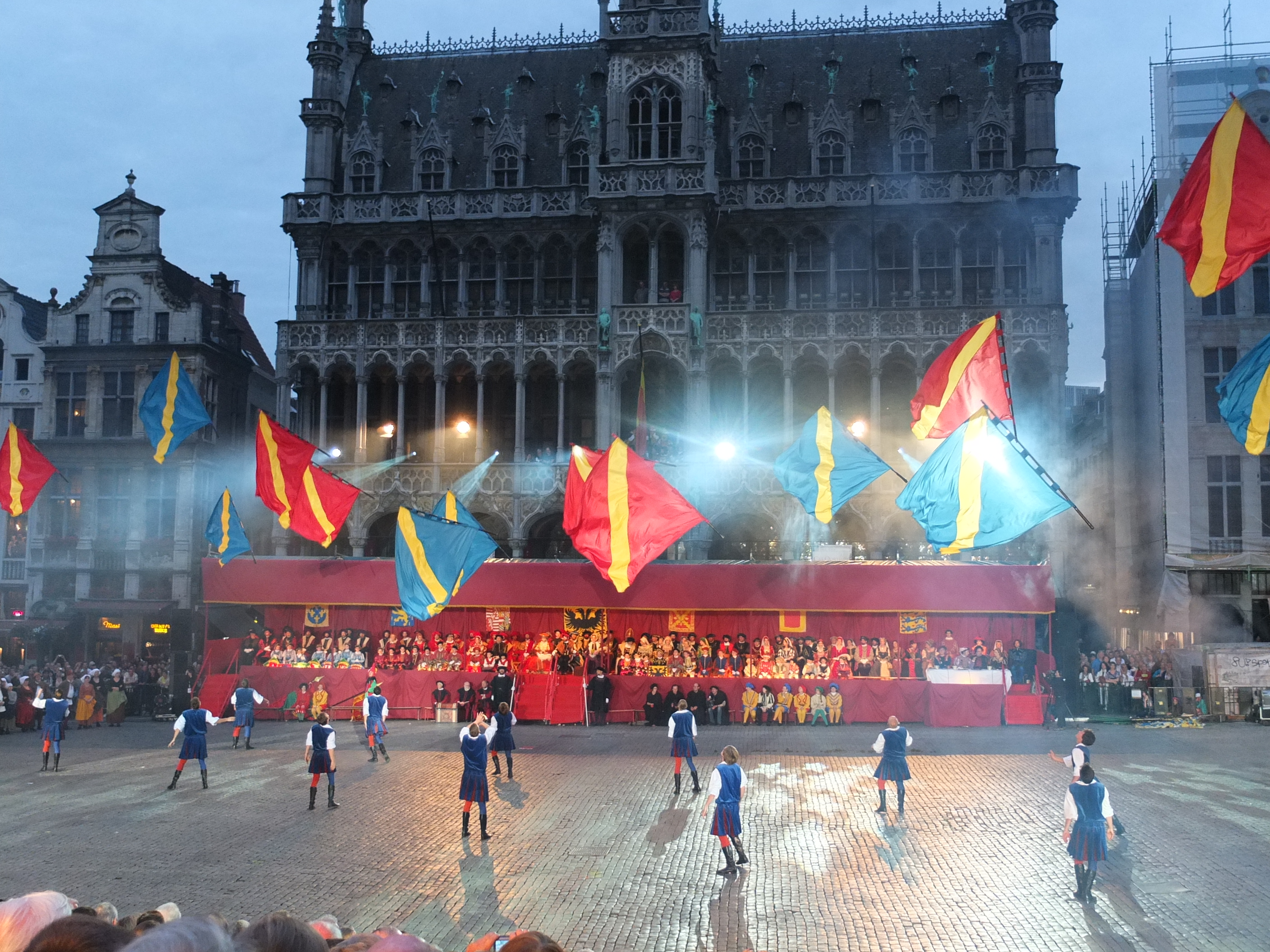 Fête annuelle de l'Ommegang, sur la Grand-Place de Bruxelles, en souvenir de Charles Quint